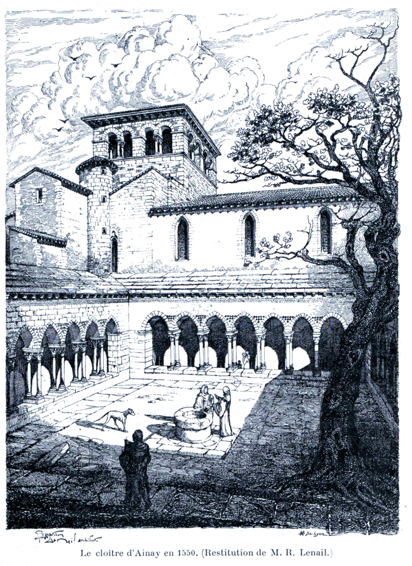 Illustration pour l'Histoire des églises et chapelles de Lyon